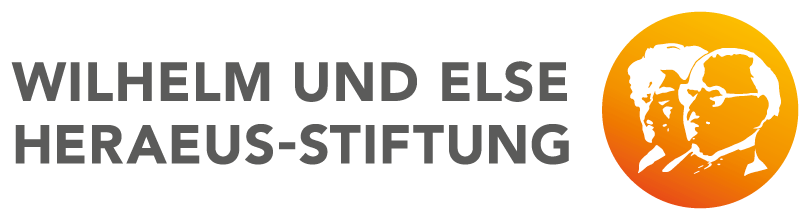 Logo Wilhelm und Else Heraeus-Stiftung